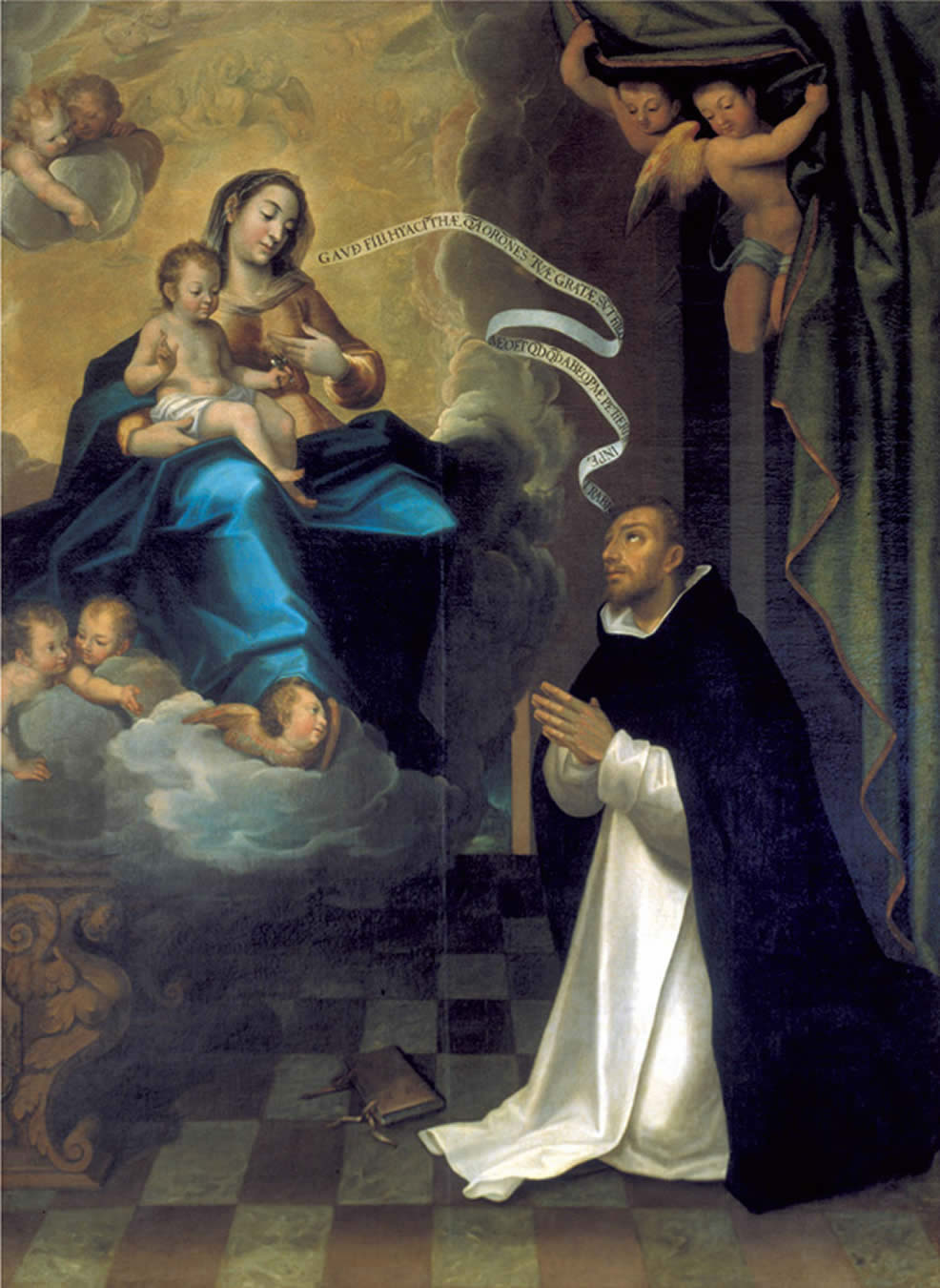 La obra representa a la Virgen María apareciéndose a San Jacinto de Polonia.